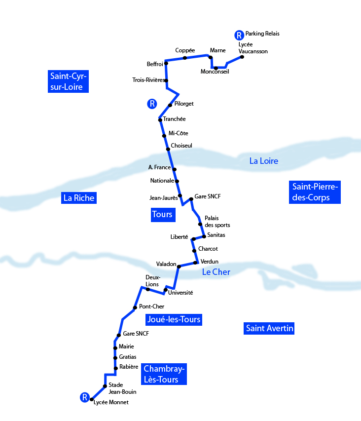 Tracé de la première ligne du tramway de Tours